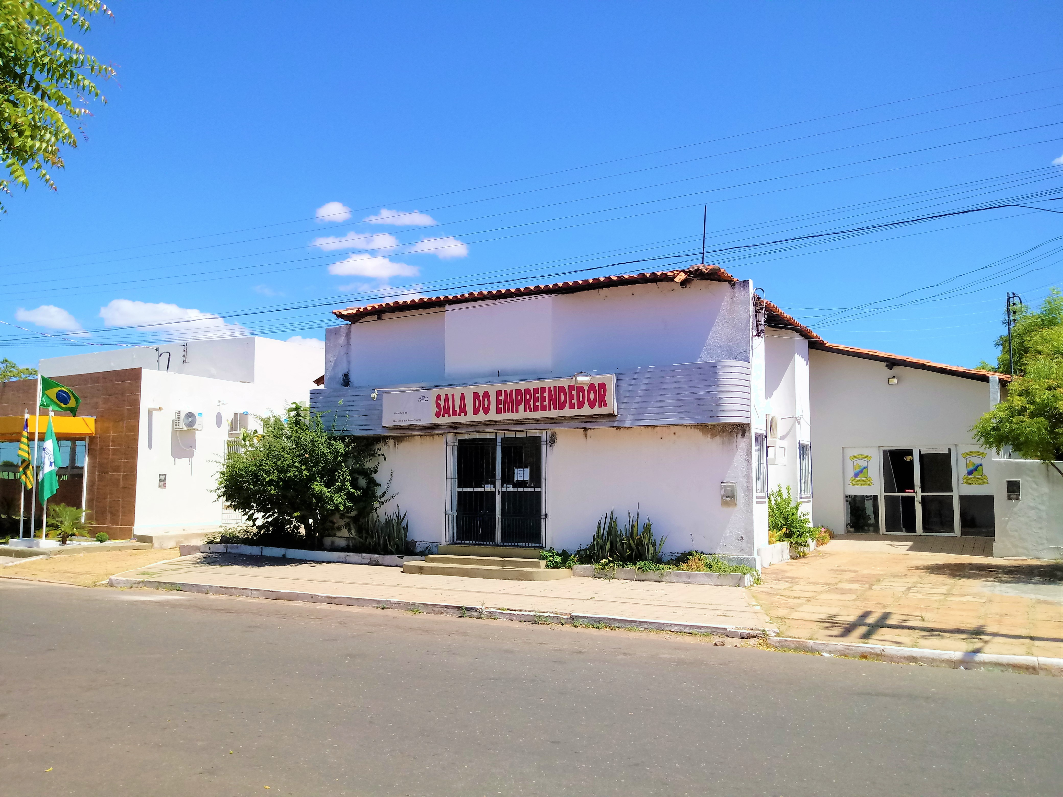 Frente da Associação Comercial e Industrial de Campo Maior em agosto de 2020.